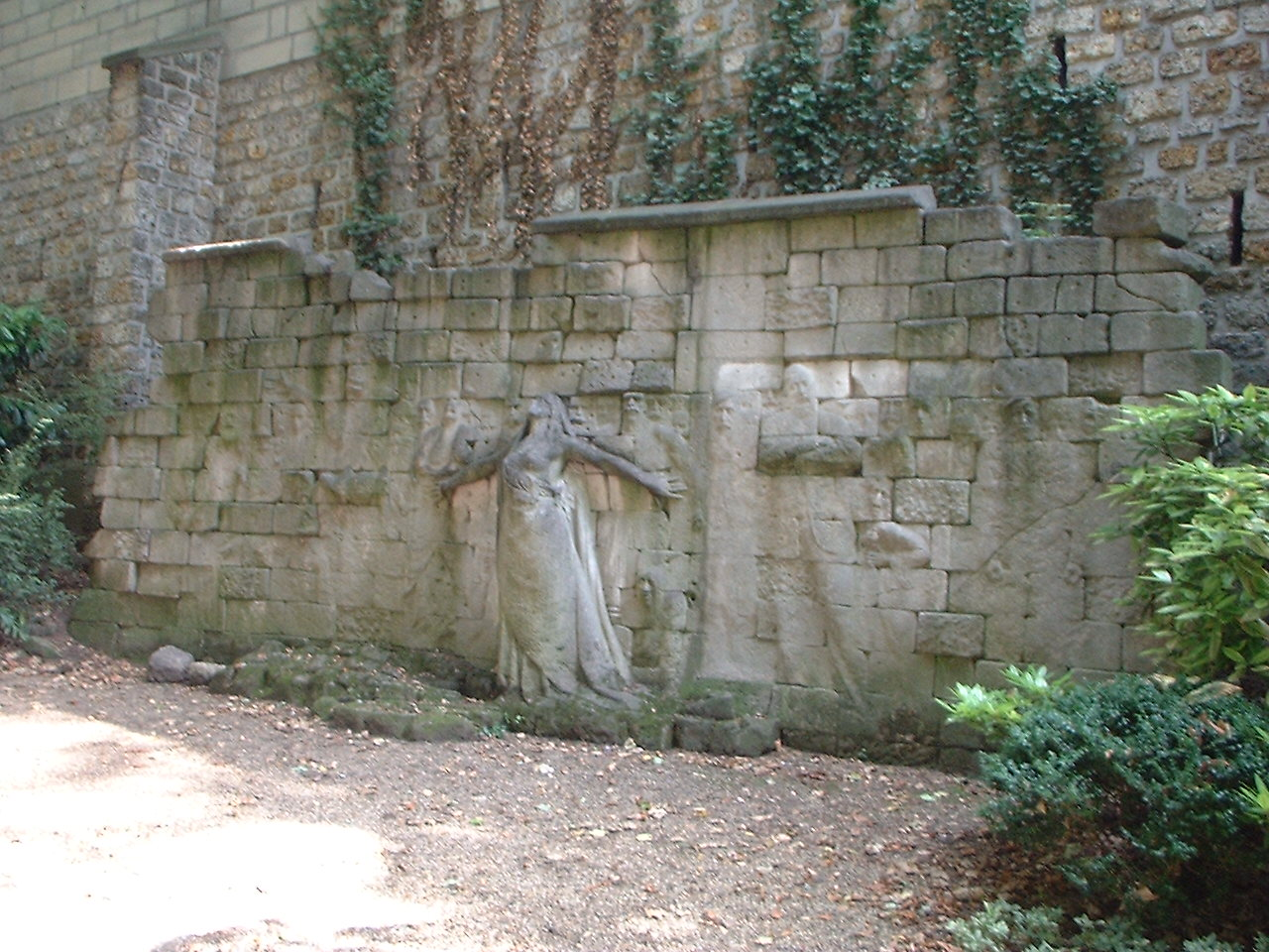 Monument du mur des fédérés, construit dans le square Samuel de Champlain le long du Père Lachaise à Paris XXe, avec les pierres originales du mur des fédérés. Sculptor: Paul Moreau-Vauthier.